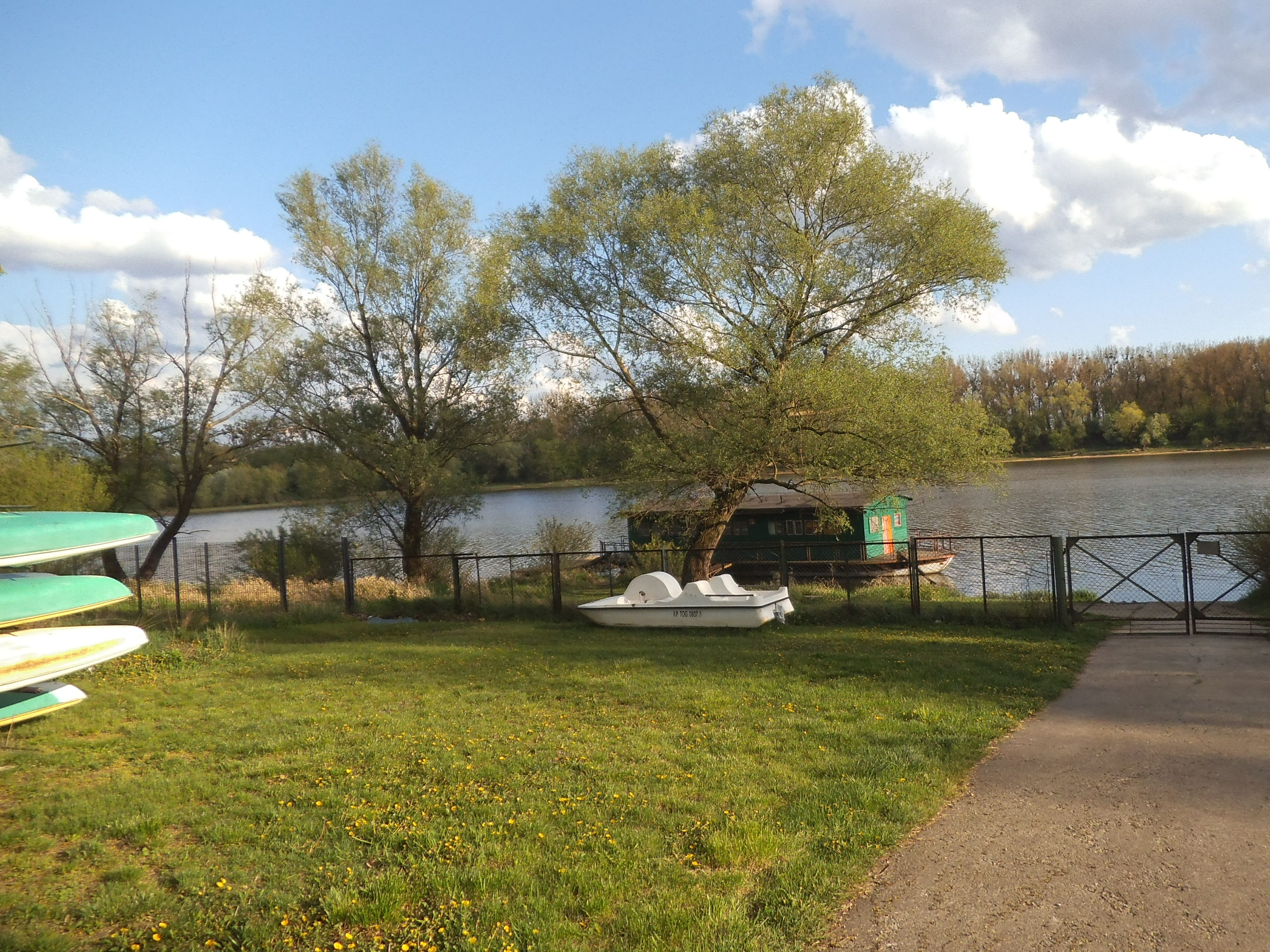 Port Drzewny w Toruniu